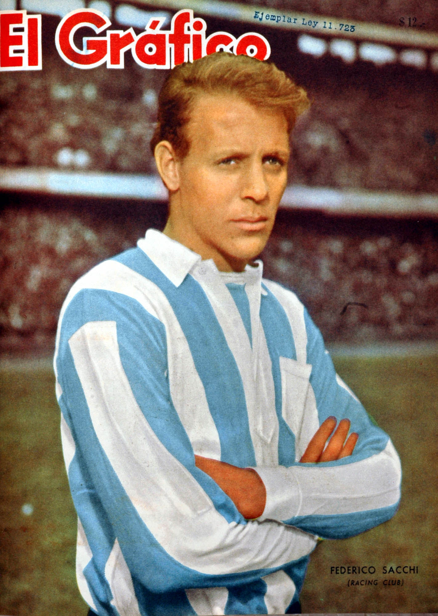 El Grafico del 21 de Junio de 1961. Edicion 2177